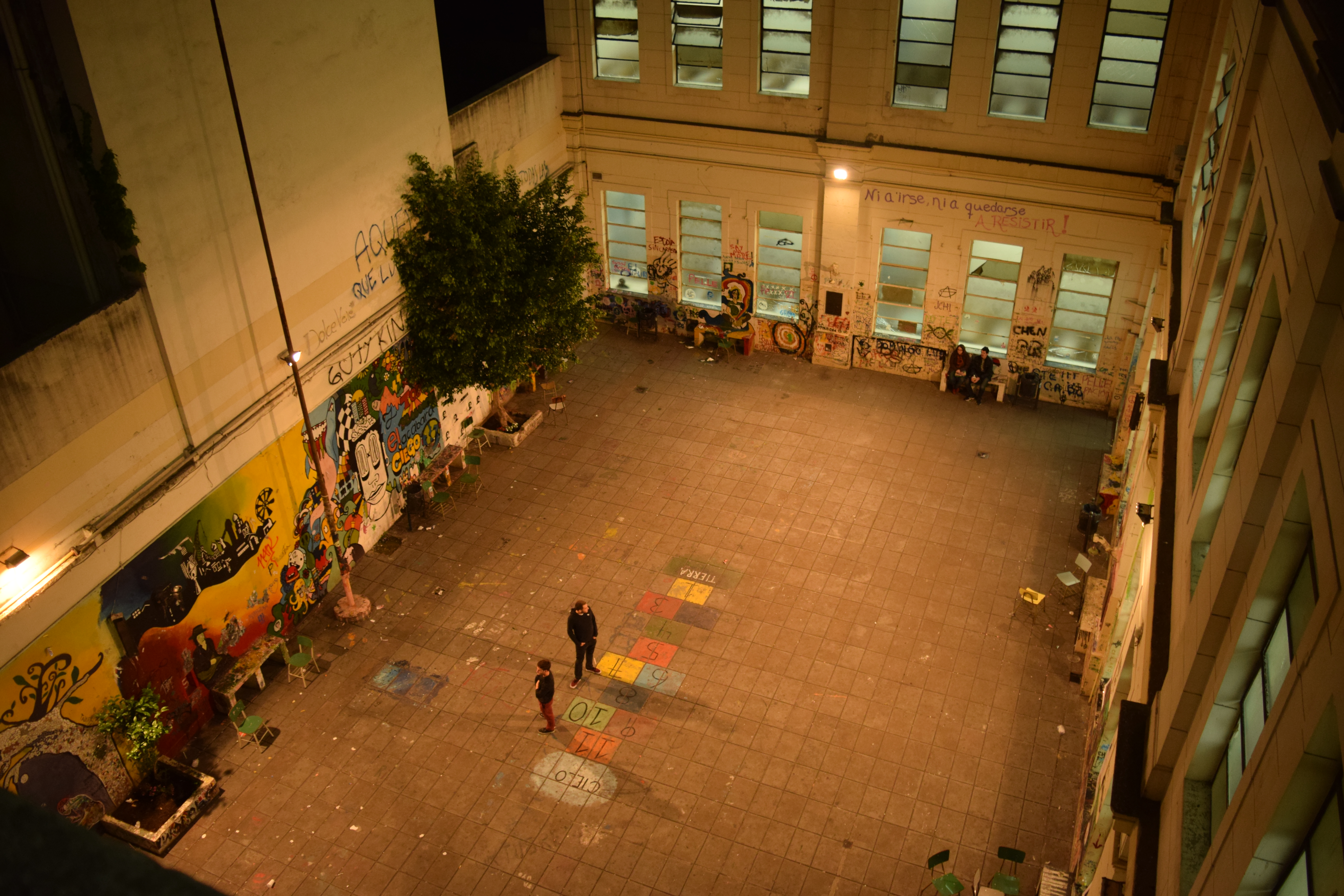 Patio de la Escuela Superior de Comercio Carlos Pellegrini dependiente de la Universidad de Buenos Aires.